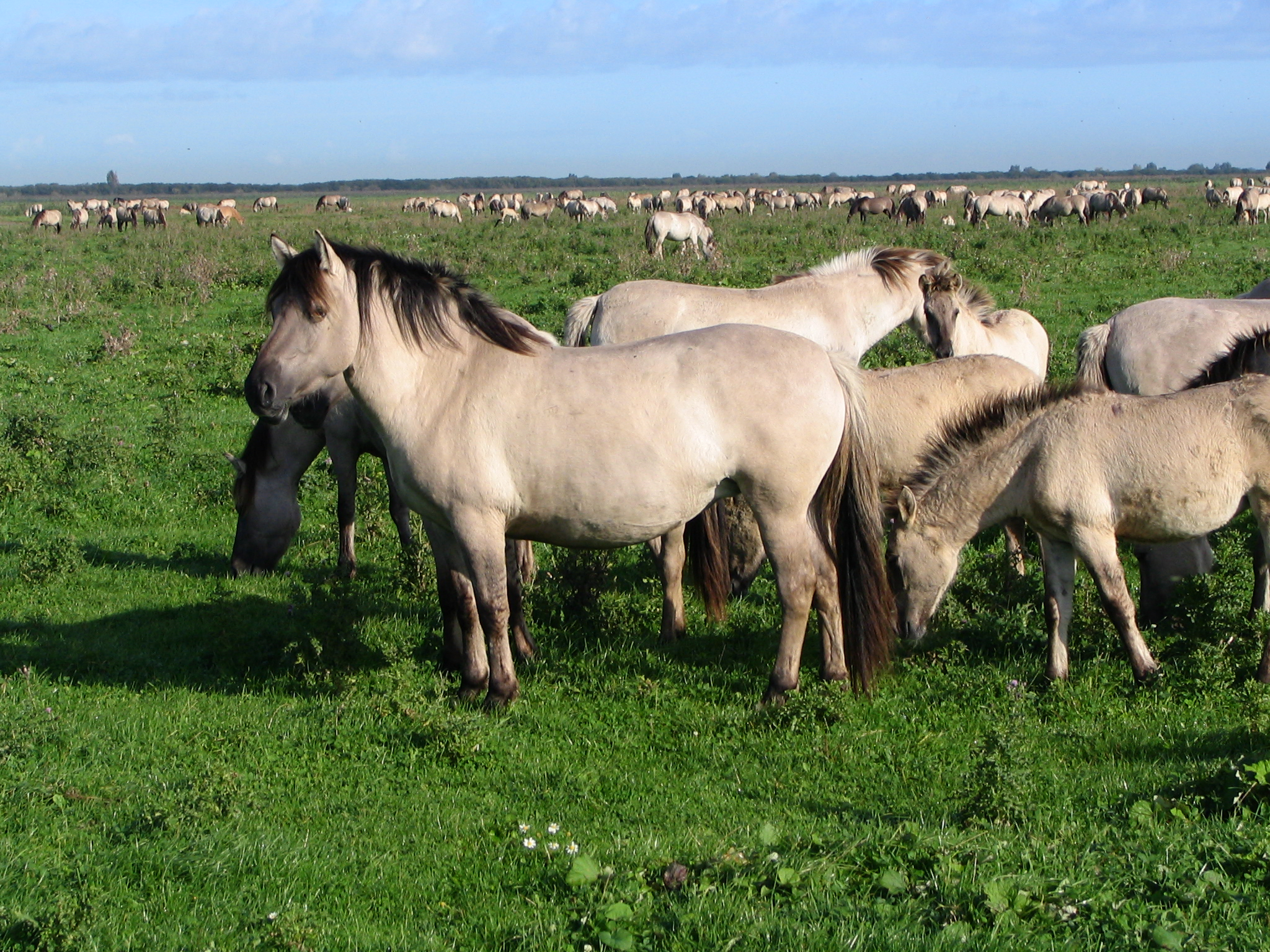 Eigen opname. GerardM Other versions: Image:Koniks3 edit.jpg